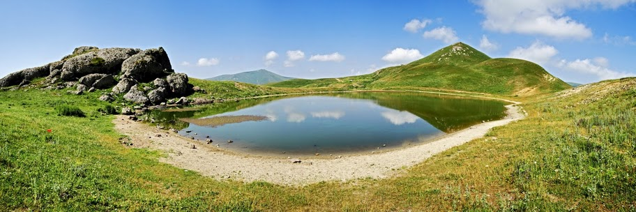 Озеро Цахкуняц на Цахкуняцском хребте